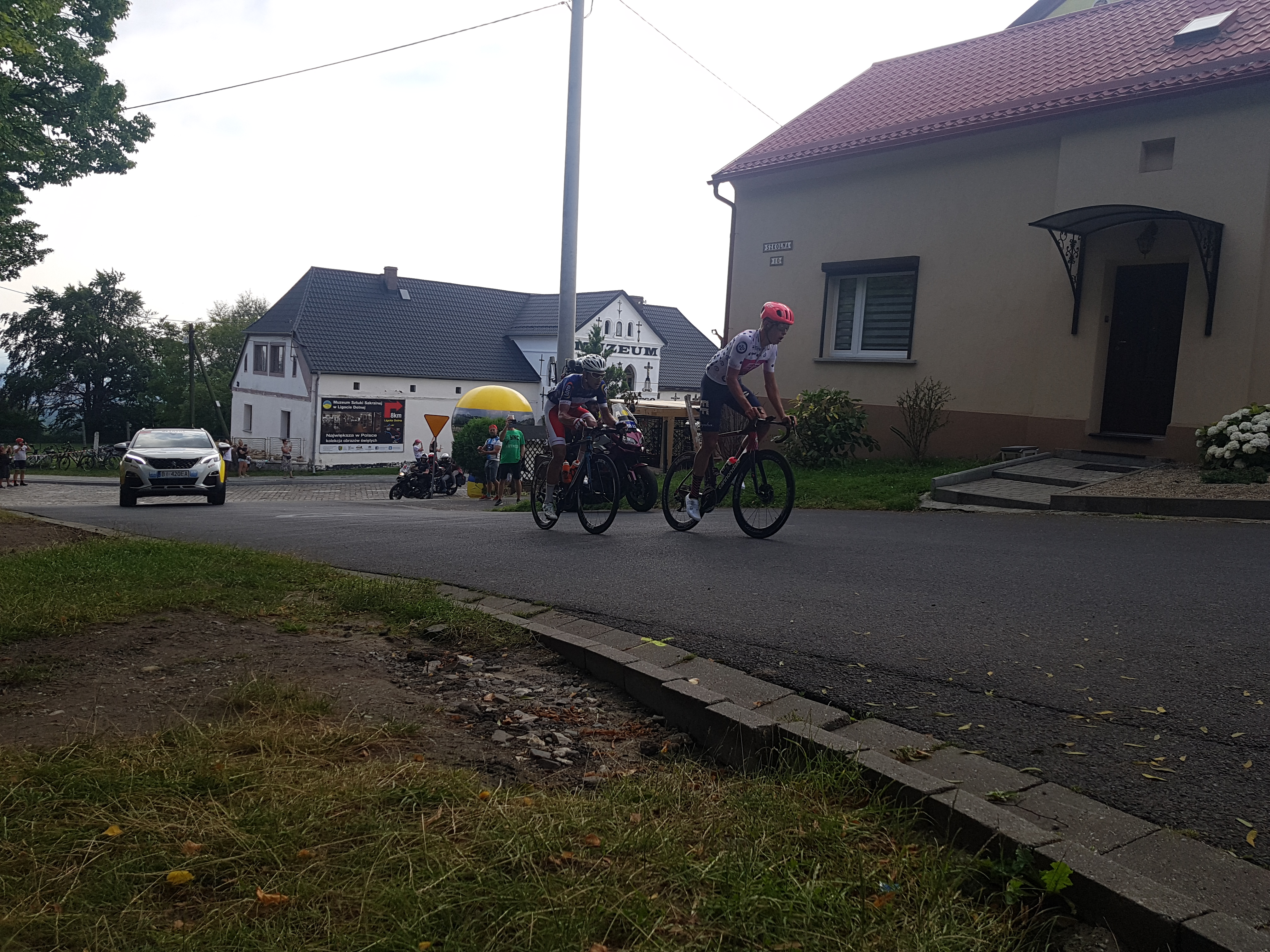 Tour de Pologne 2020, etap II (6 sierpnia 2020), tuż przed górską premią na Górze Świętej Anny. Na zdjęciu dwaj uciekający kolarze, Julius van den Berg (z przodu) i Maciej Paterski